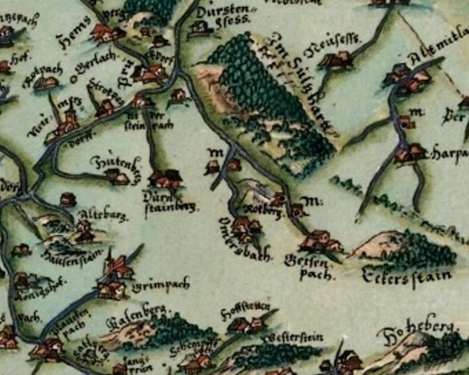 Ausschnitt Teufelsgrund aus der historischen Spessartkarte von Paul Pfinzing.